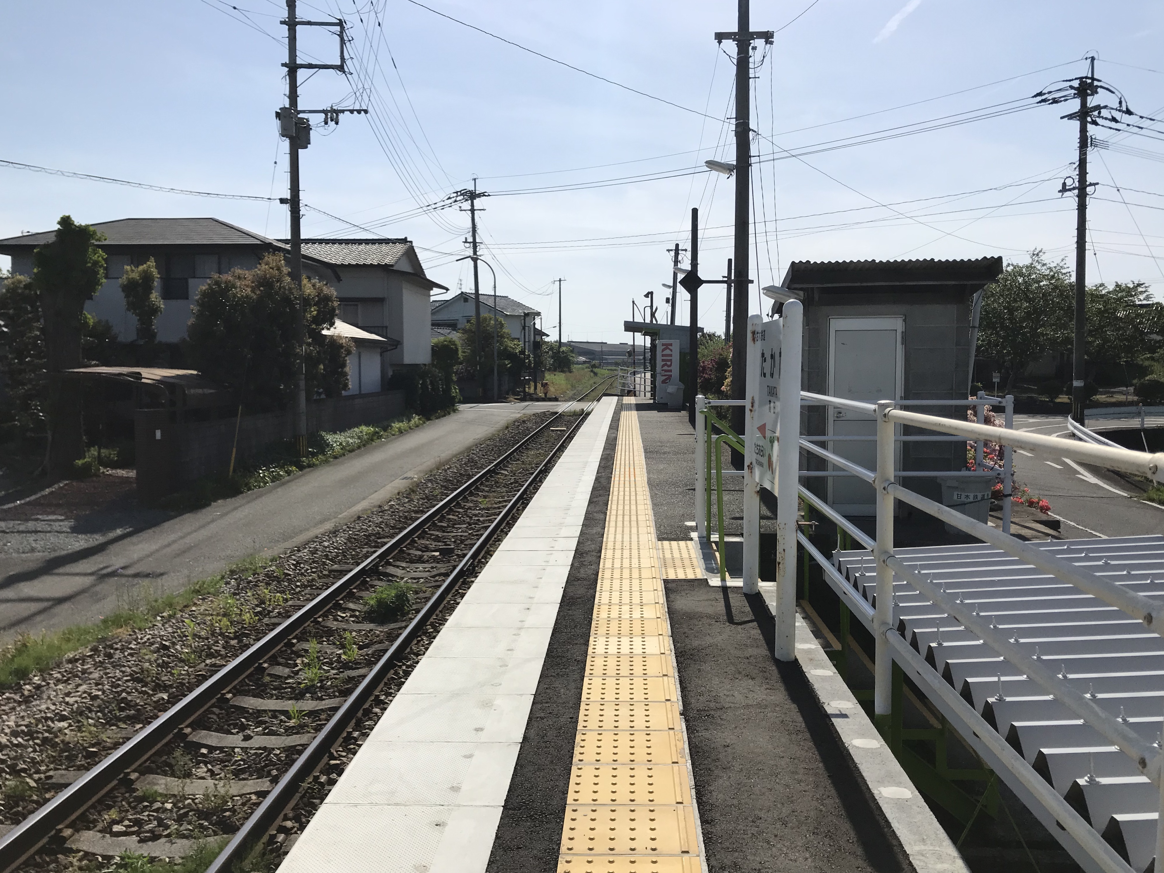 高田駅のホーム(奥は太刀洗方面)